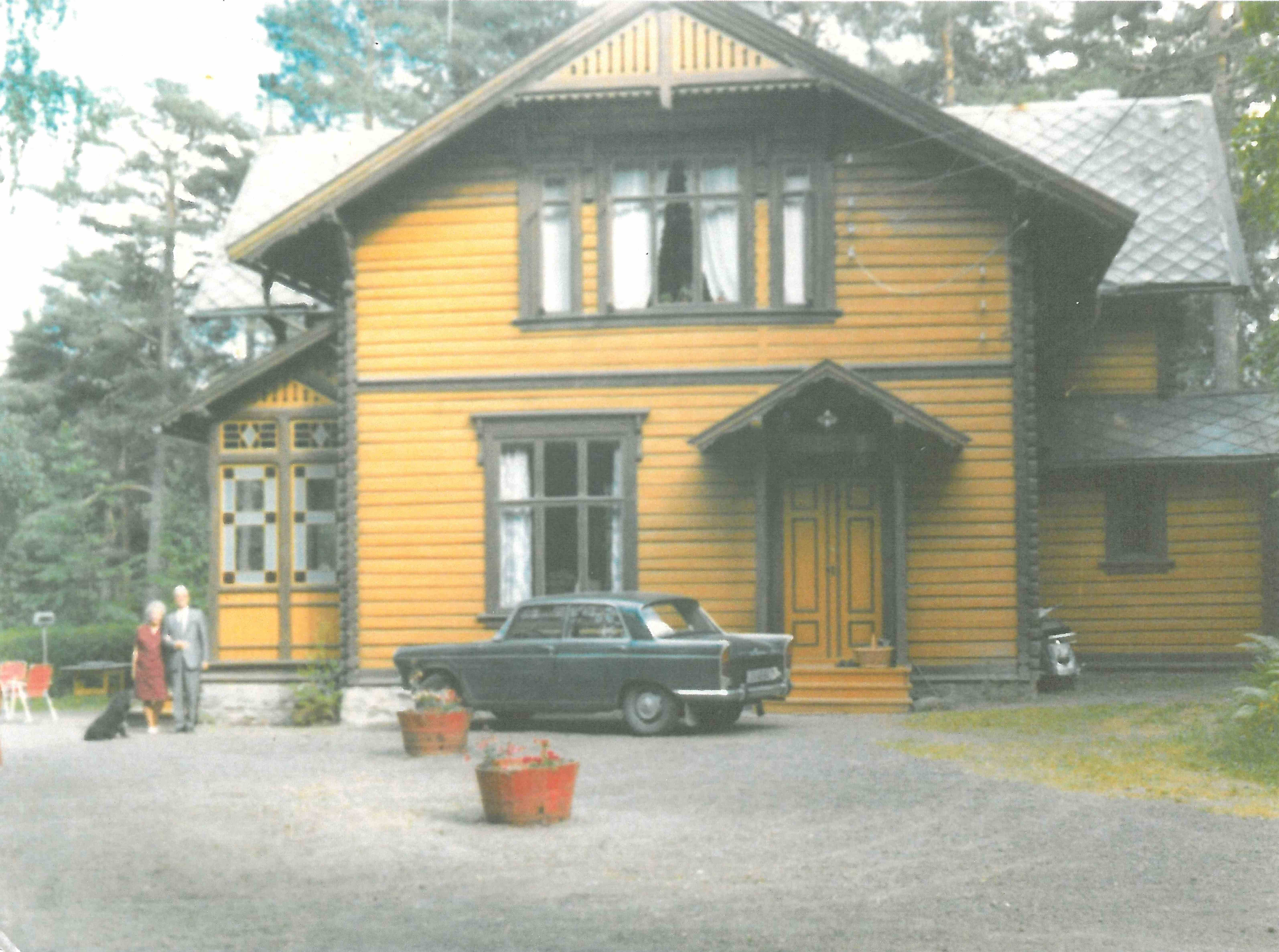 Villa Gräpling og familien Lorentzen i 1968